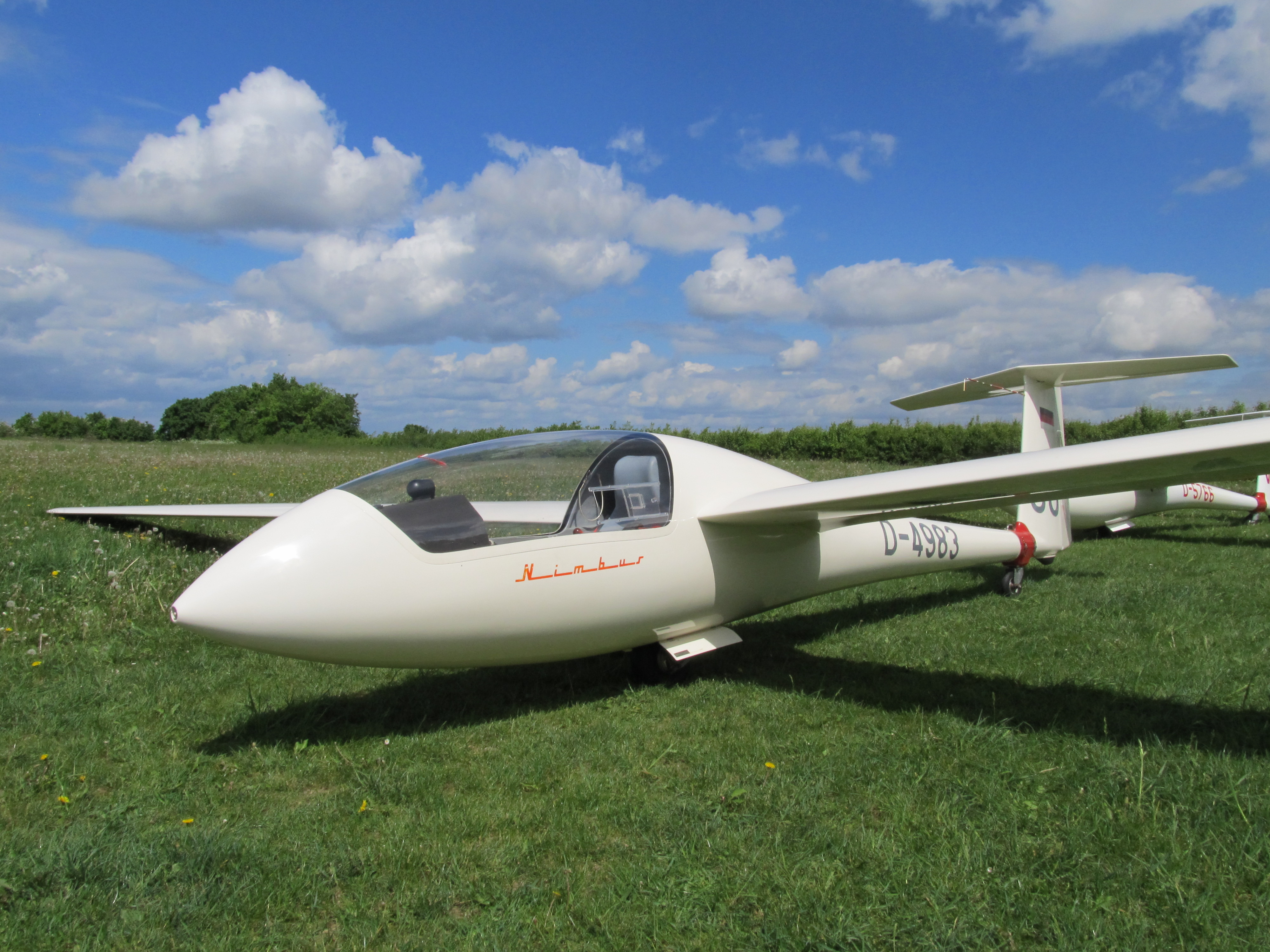 Nasenansicht